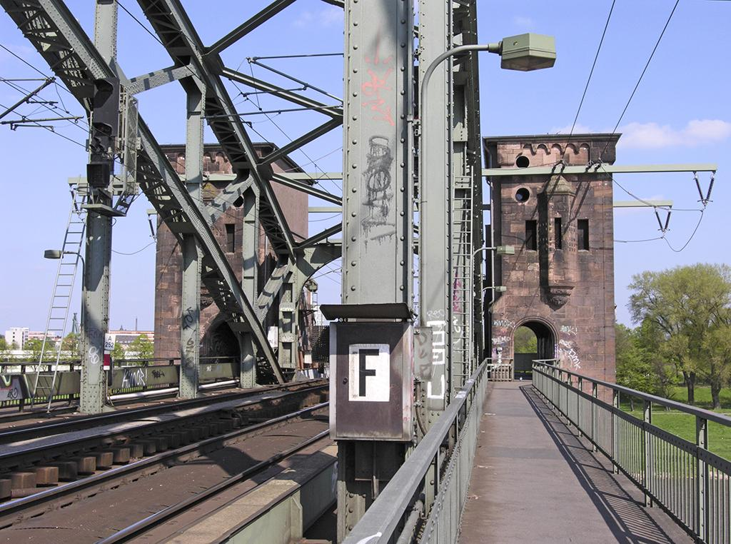 Köln-Poll, Südbrücke (Türme auf der rechten Rheinseite); Ausleger für 110-kV-Bahnstromleitung Köln–Sindorf This is a photograph of an architectural monument.